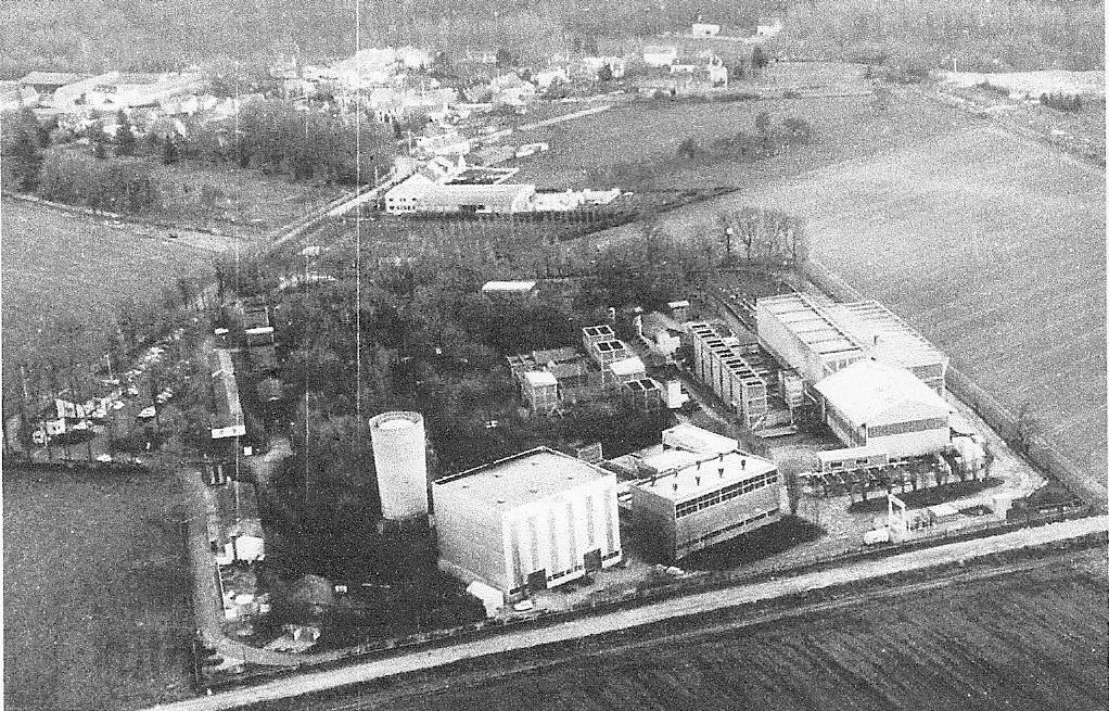 L'usine Hispano dans les années 1980 à Guyancourt (Batterie de Bouviers)